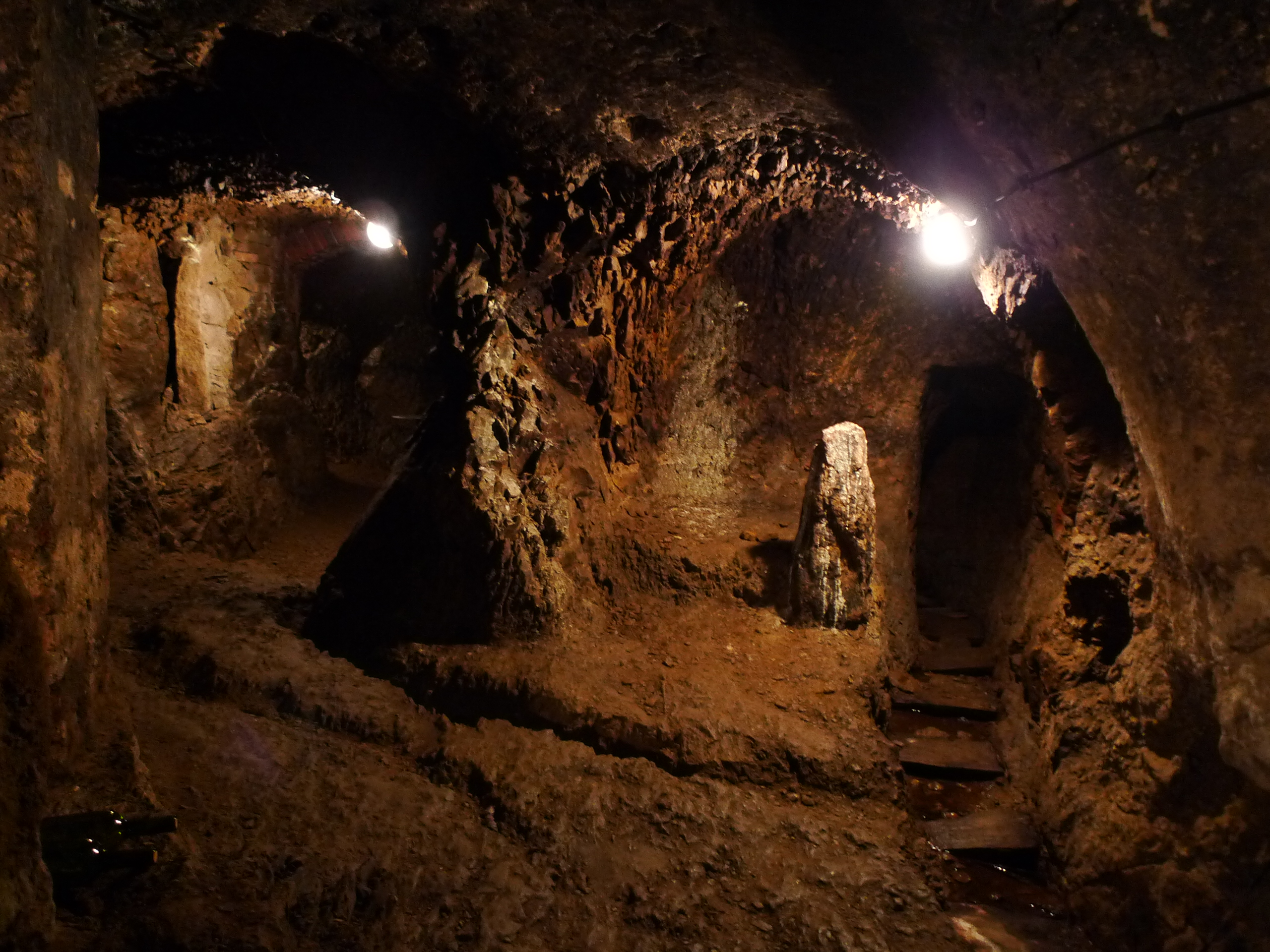 Kanalizační síť - podzemní odvodňovací systém (Slavonice), pod historickým jádrem města, Slavonice, Slavonice.